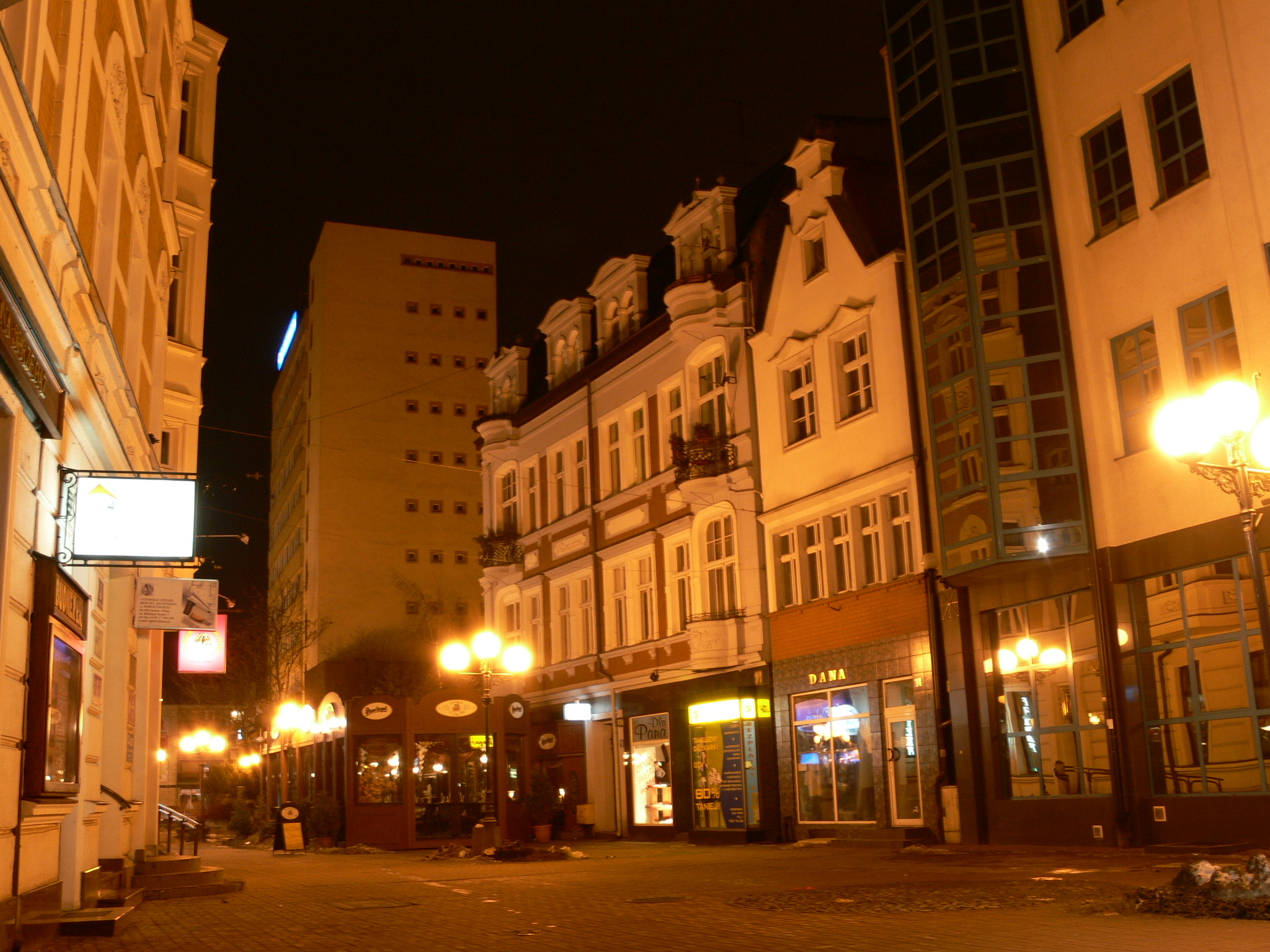 Gorzów - Wełniany Rynek nocą Autor : Bartek Wawraszko (Bast)